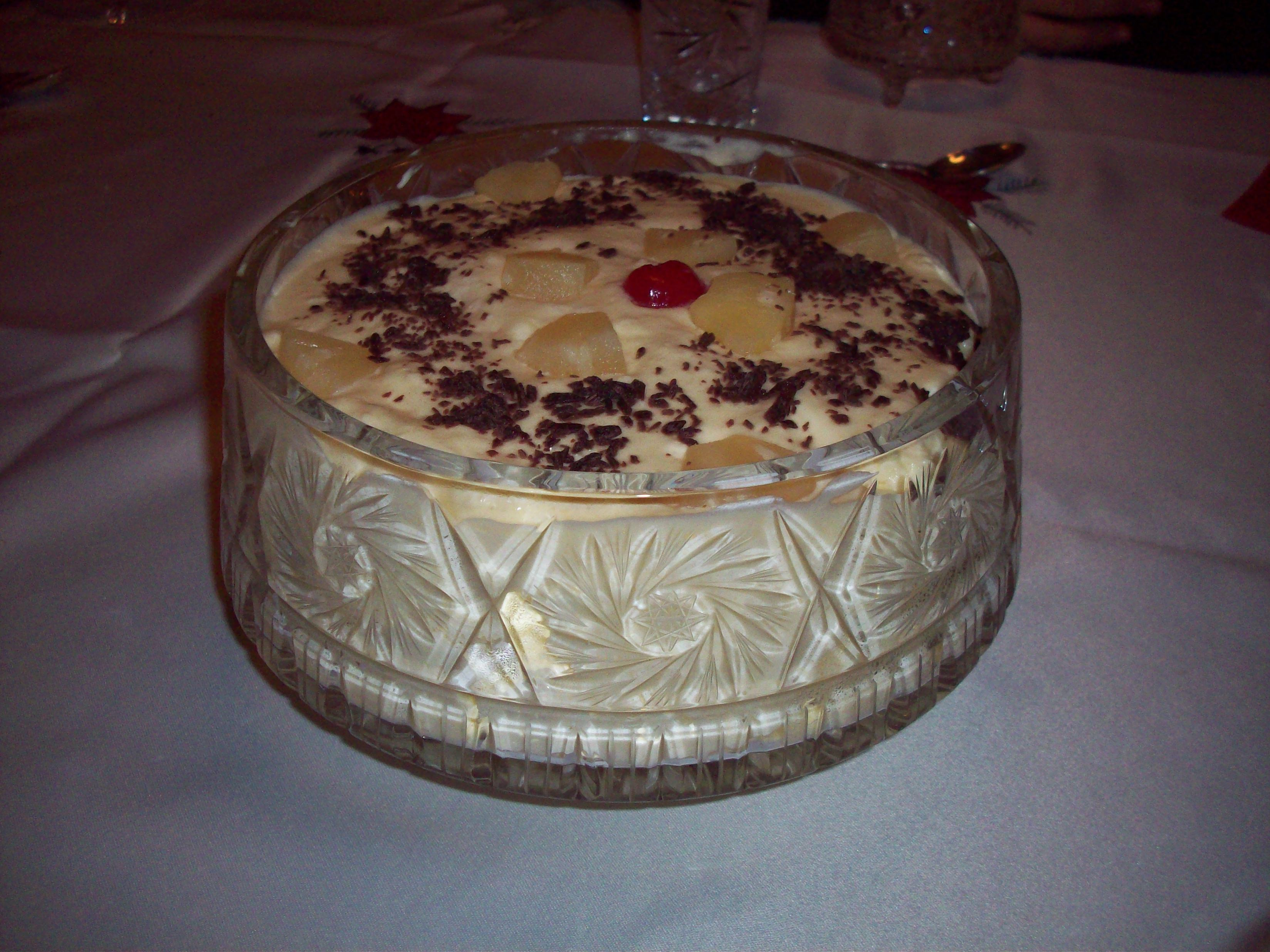 Frómans